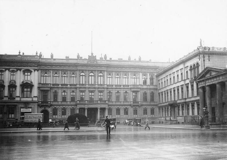 Blücher-Palais, jetzige amerikanische Botschaft am Pariser Platz 1932